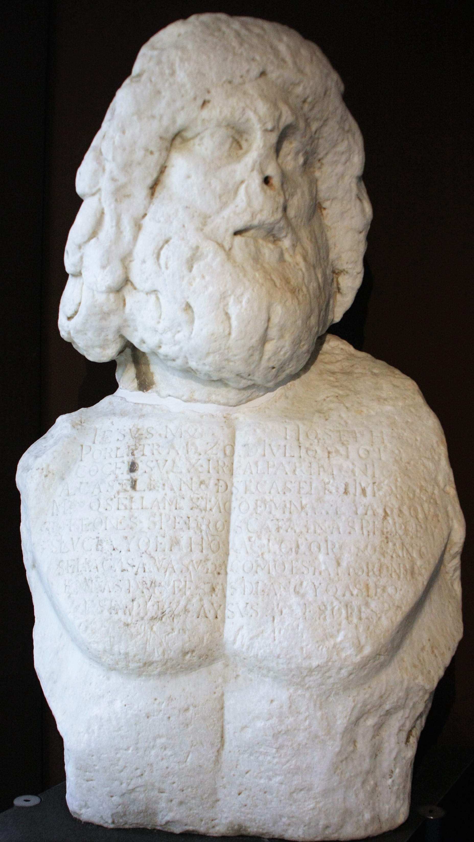 Poseidone-Asclepio iscrizione castello maniace 1618